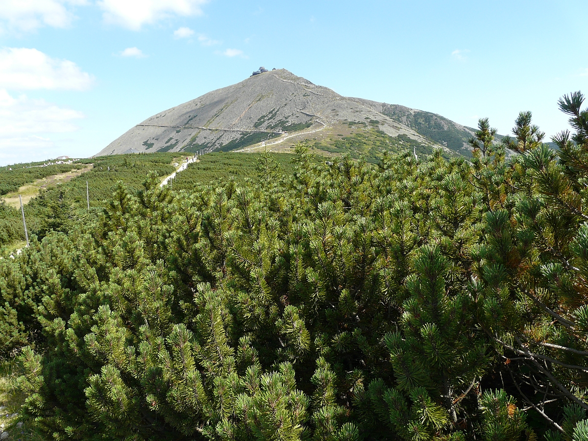 Karkonosze